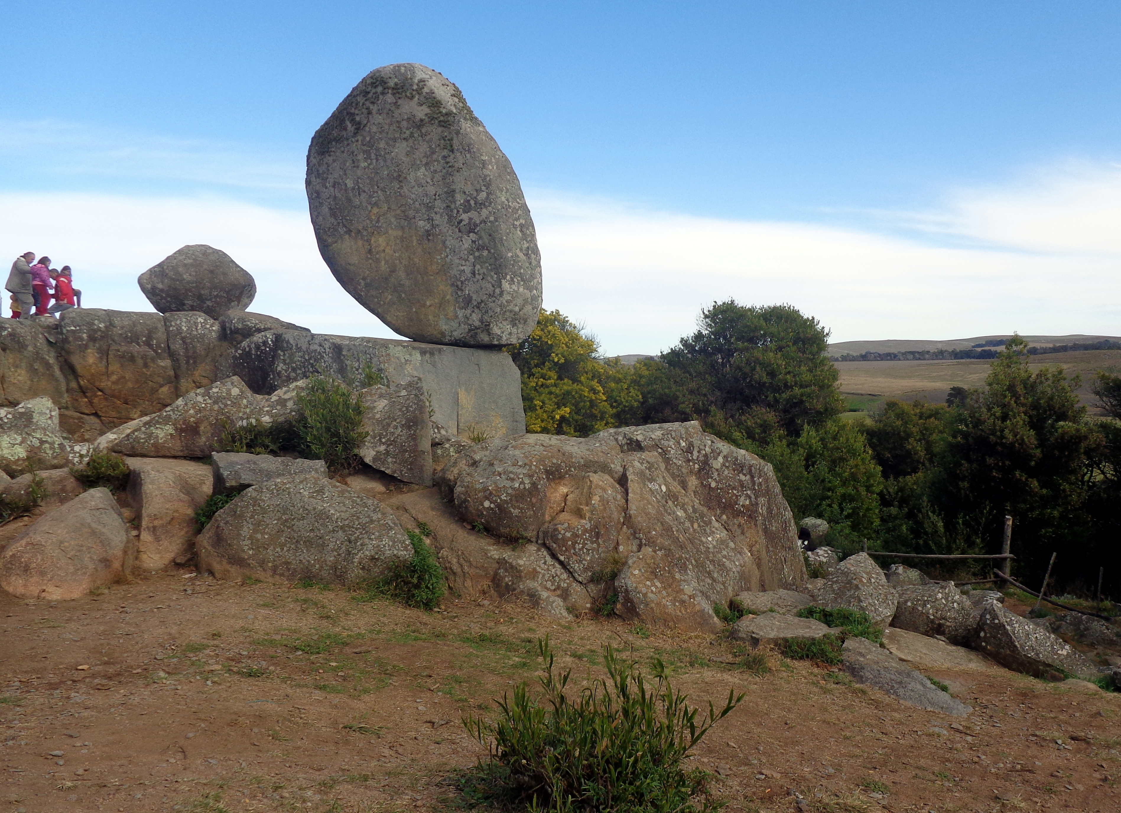 Cerro El Centinela, Tandil, provicia de Buenos Aires, Argentina.